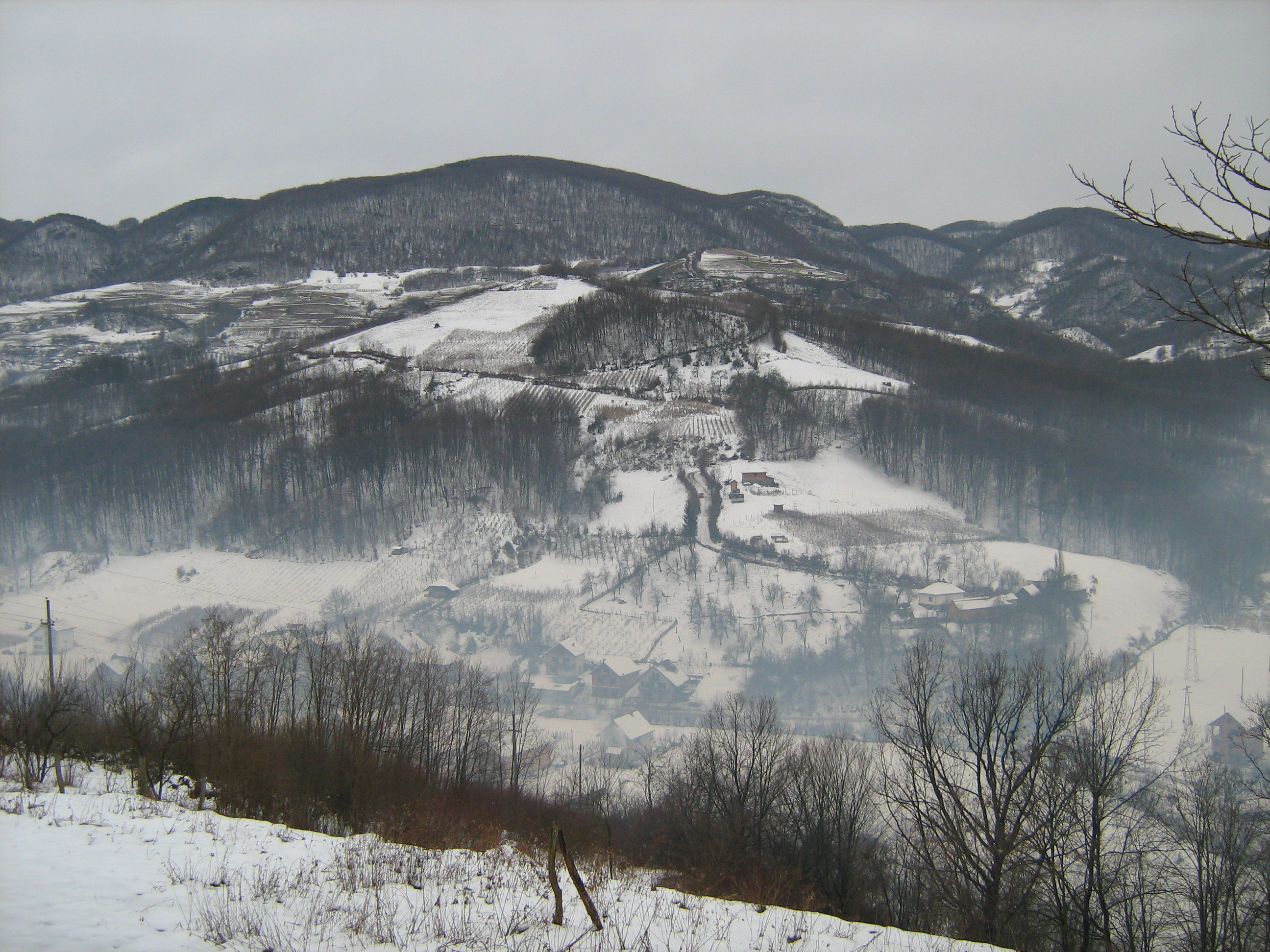 village Tomanj near Krupanj, winter 2007/08